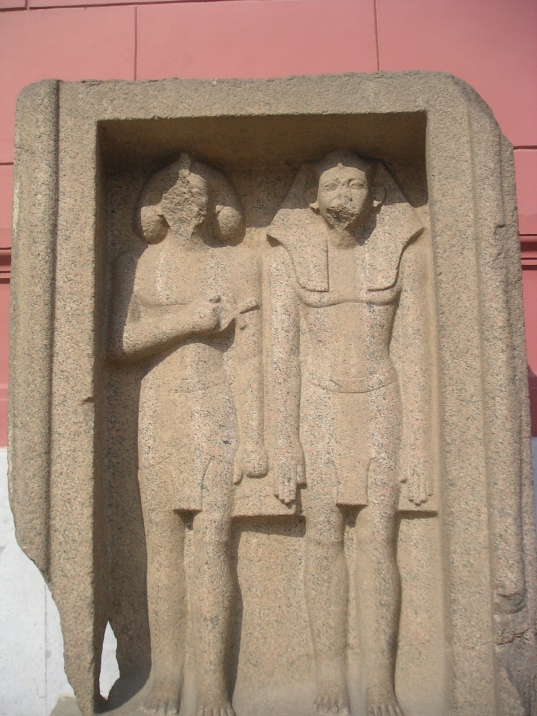 Dyade d'Amenemhat III provenant du temple funéraire de sa pyramide à Hawara